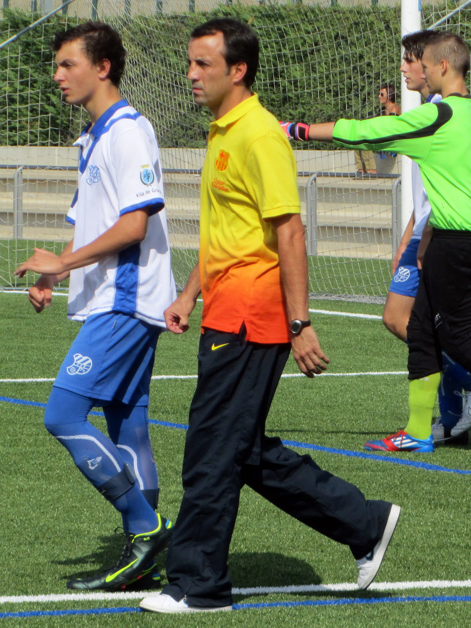 Foto realizada por Javier Segura (@castroquini)